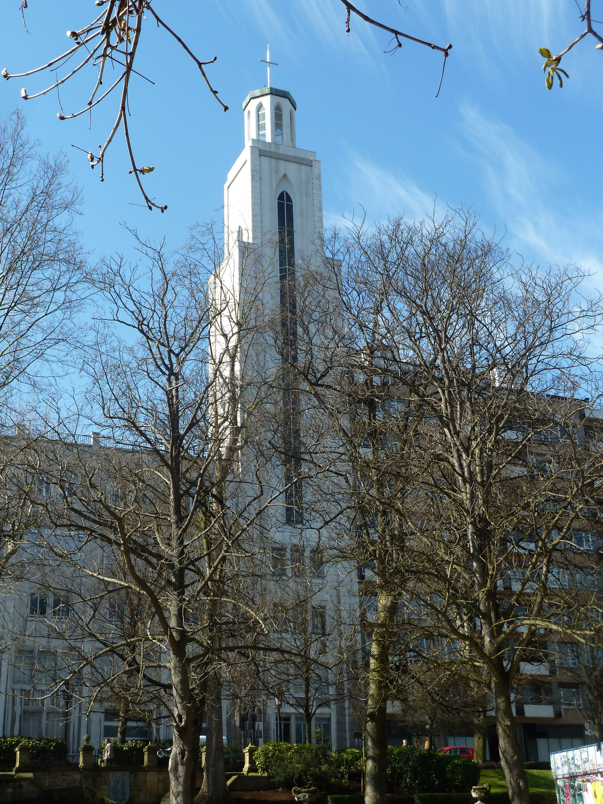 Oviedo Parroquia de Nuestra Señora del Carmen, carmelitas descalzos, Oviedo.